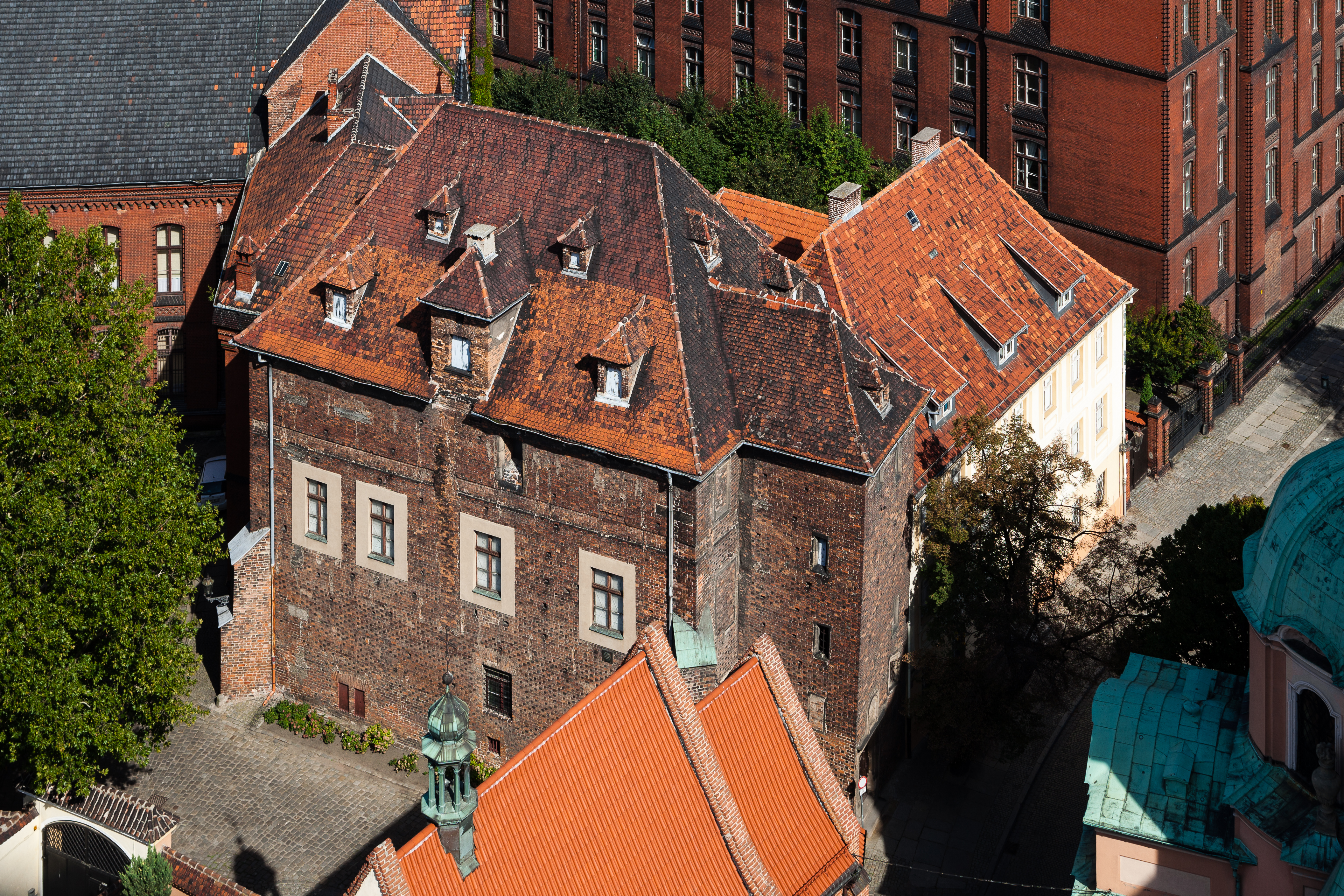 Dom kapituły